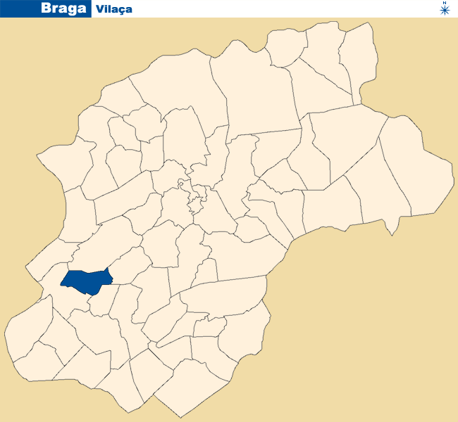 Localização de Vilaça no concelho de Braga.